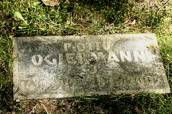 Grabstein Otto Ogiermann SJ auf dem Hedwigsfriedhof Berlin-Reinickendorf